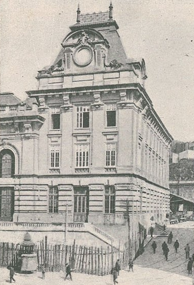 Estação Ferroviária de São Bento, na cidade do Porto, em Portugal, durante a fase final da sua construção. Esta imagem foi publicada na Ilustração Portuguesa n.º 545 (Série II), de 31 de Julho de 1916, e digitalizada pela Hemeroteca Municipal de Lisboa.